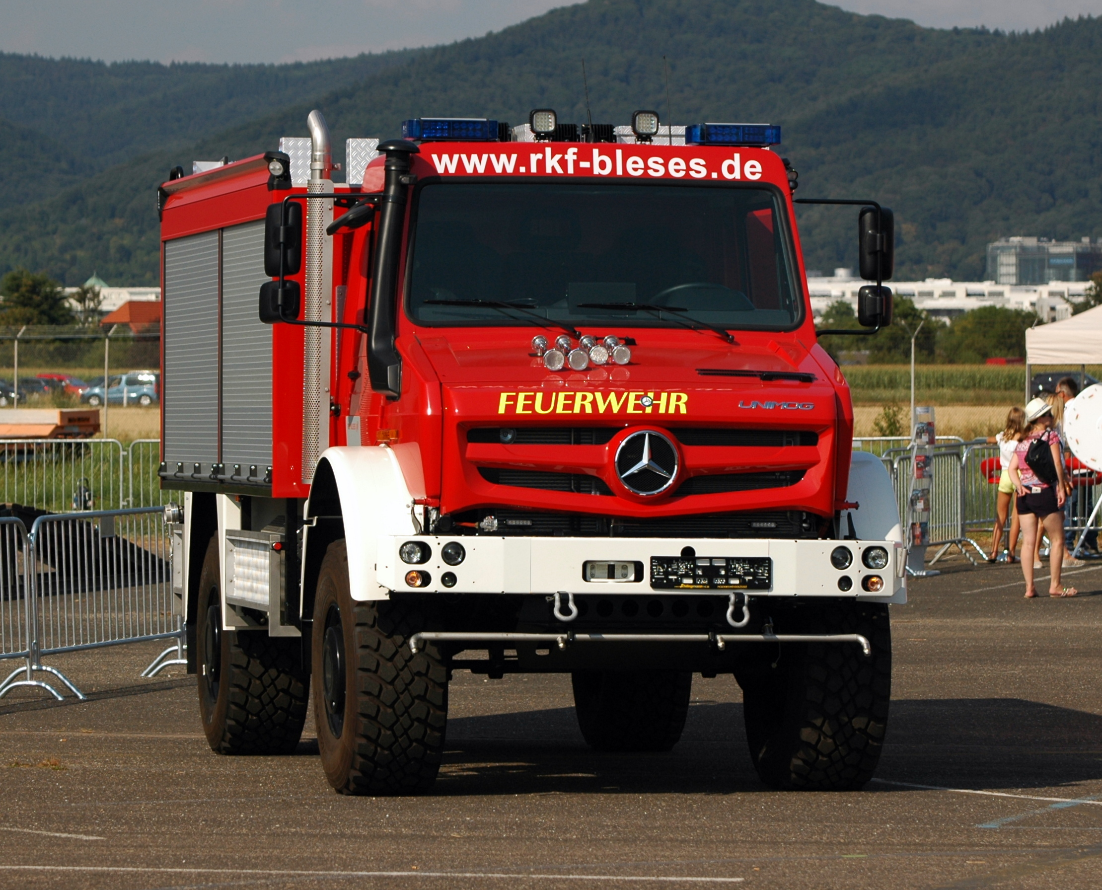 Heidelberg Airfield - Mercedes-Benz Unimog U5023 - RKF BLESES